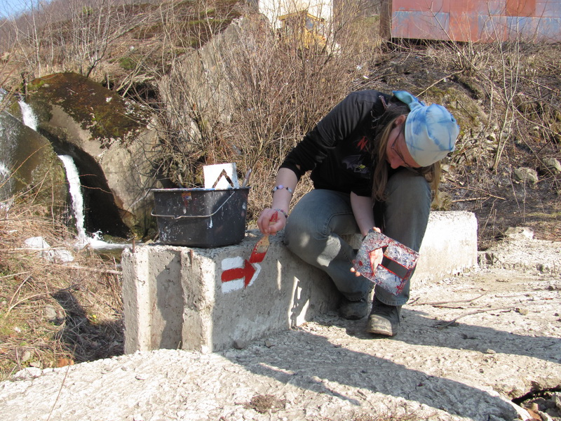 Маркування ЗТШ